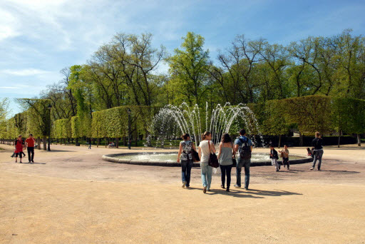 Fontaine du Parc de Blossac